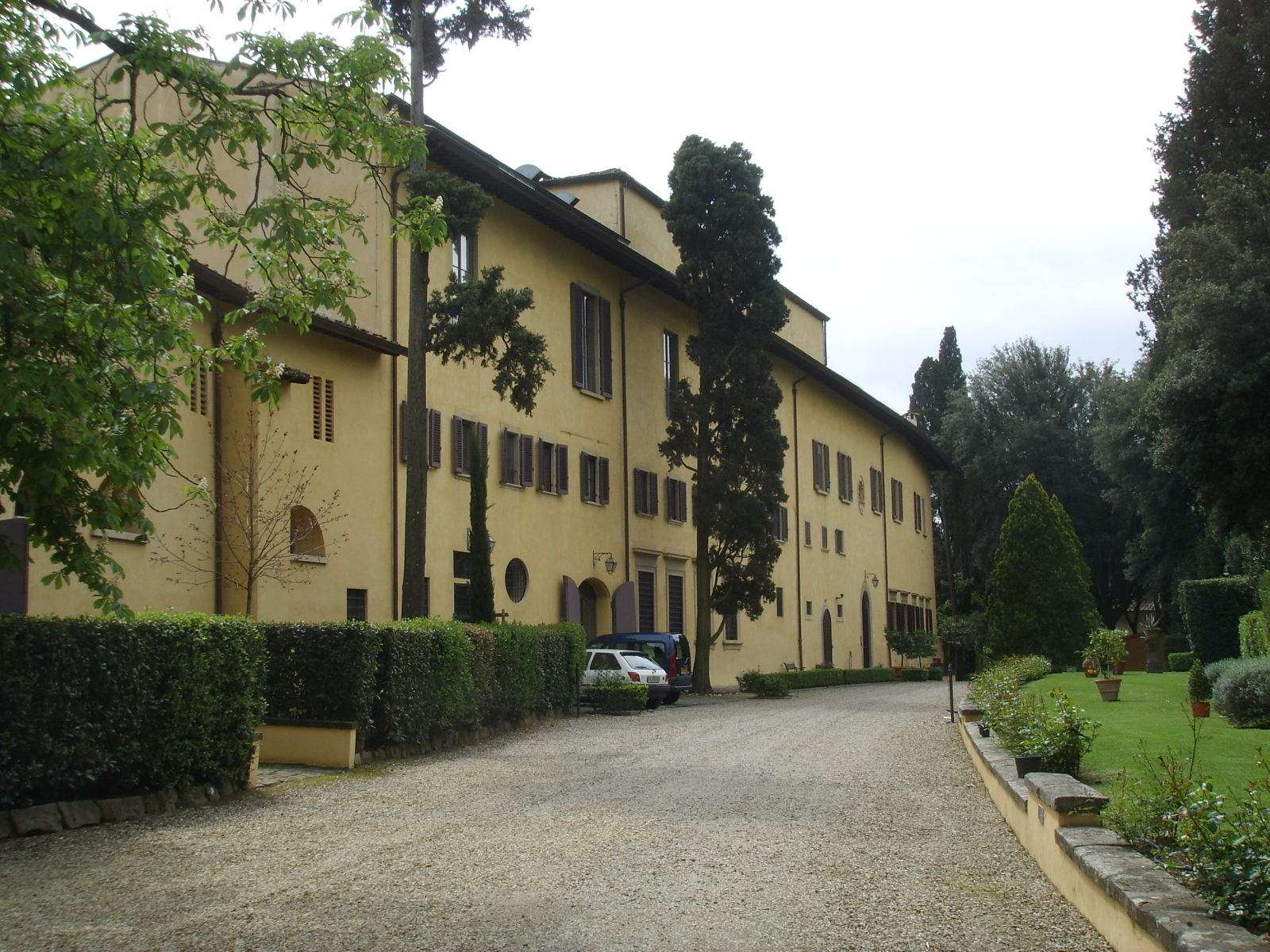 Villa finaly